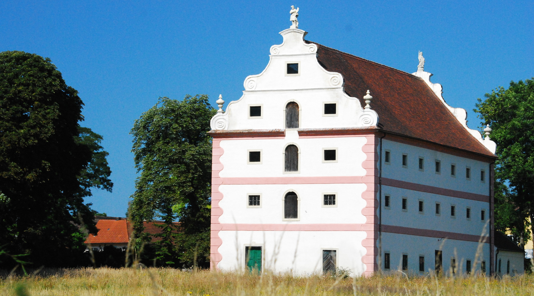 Schüttkasten von Schloss Harmannsdorf in Harmannsdorf in Niederösterreich